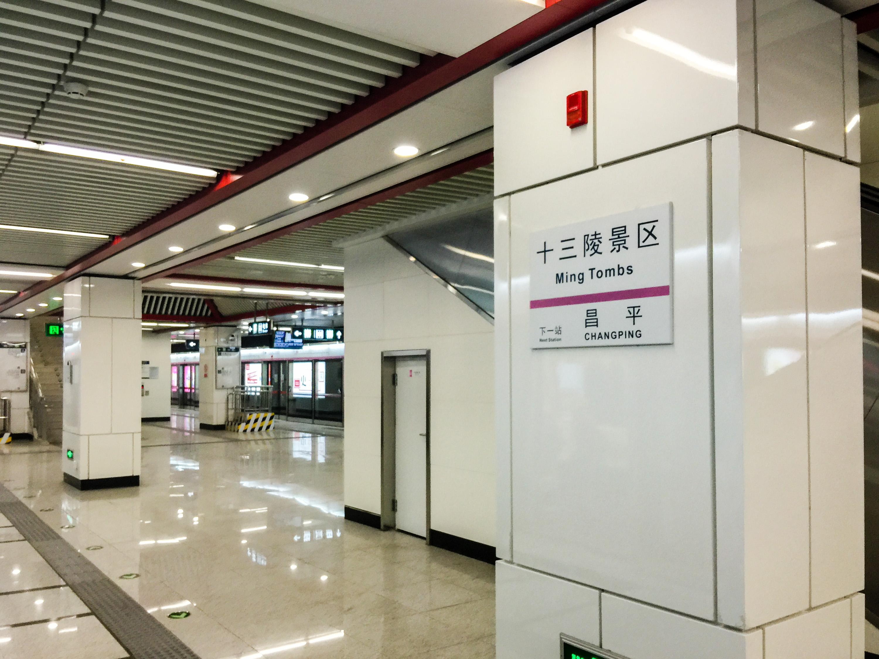 中文（中国大陆）: 北京地铁昌平线十三陵景区站站台，2015年12月26日